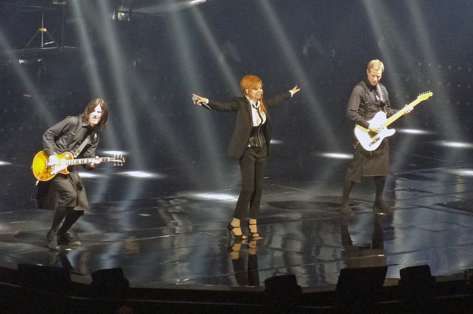 Mylène Farmer lors du concert Timeless 2013, le 17 septembre 2013 à Paris-Bercy, France.